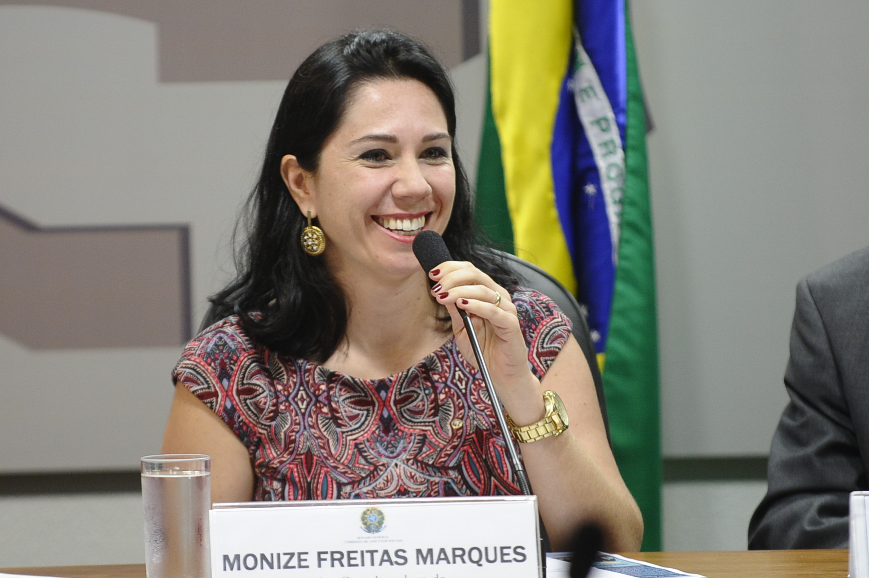 Comissão de Assuntos Sociais (CAS) durante audiência pública interativa para debater a conjuntura das políticas públicas asseguradoras de direitos das pessoas idosas. Em pronunciamento, Juíza Coordenadora da Central Judicial do Idoso do Tribunal de Justiça do Distrito Federal e Territórios, Monize da Silva Freitas Marques. Foto: Marcos Oliveira/Agência Senado.